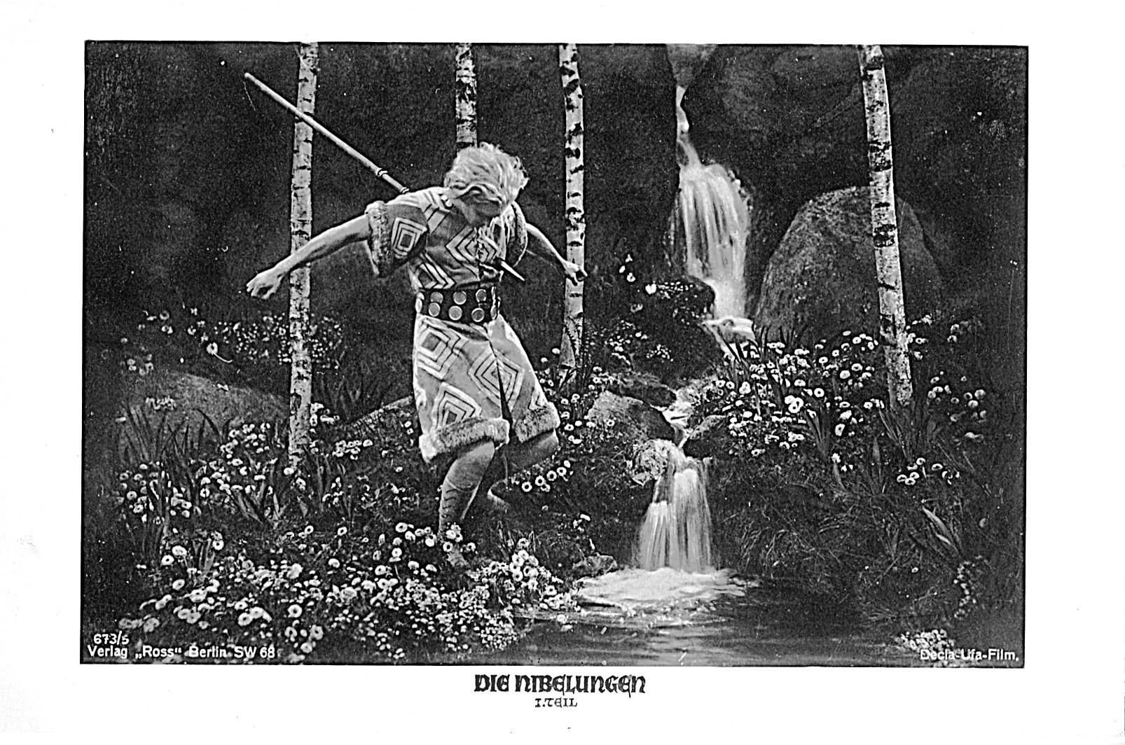 Siegfrieds death.jpg